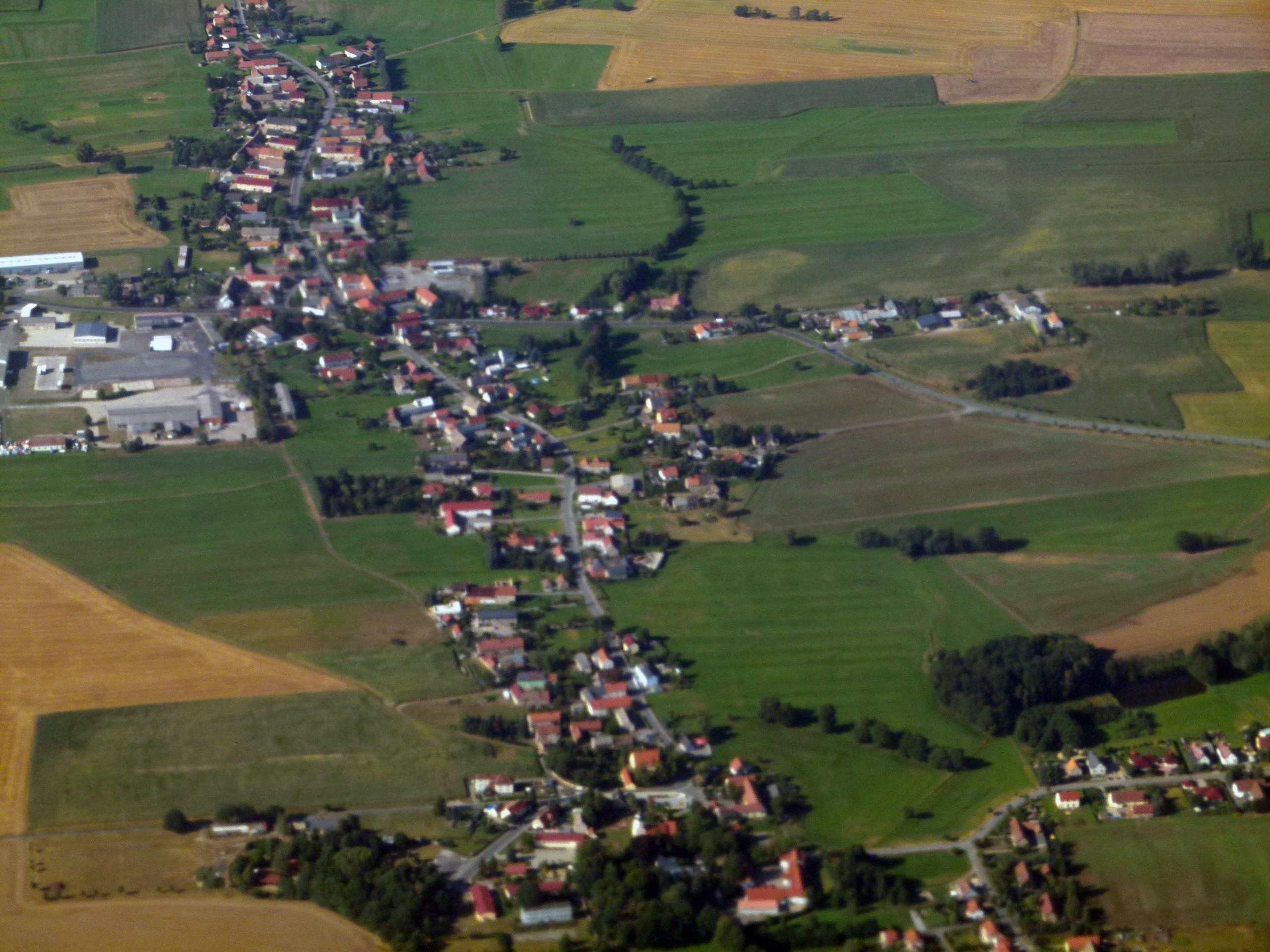 BNlick auf Sacka (Thiendorf), Sachsen